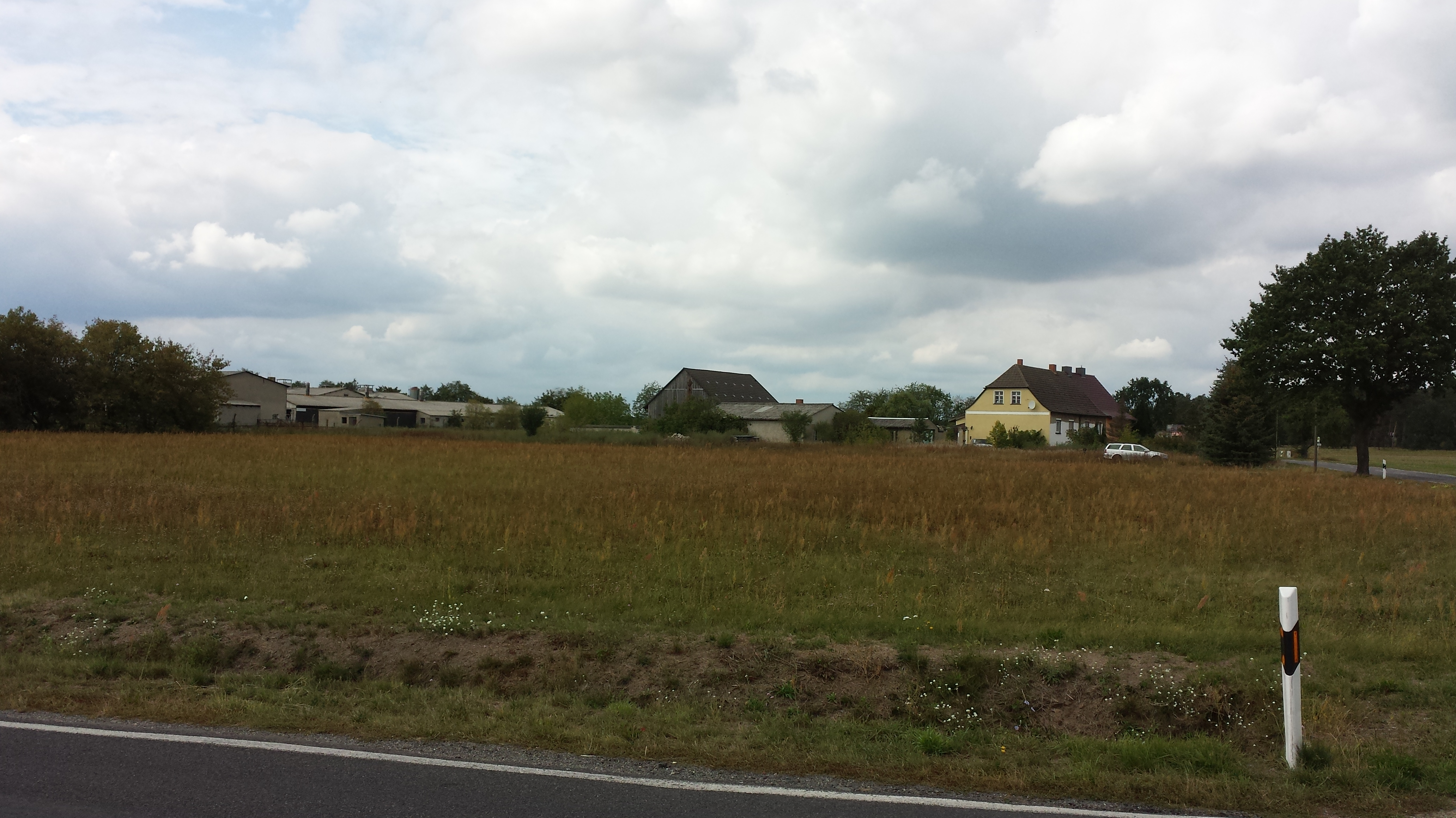 Ansicht des Wohnplatzes Marienhof von Südosten